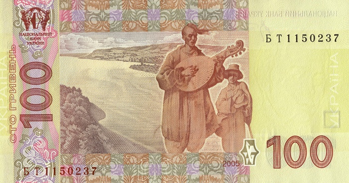 100 hryvnia 2005 back